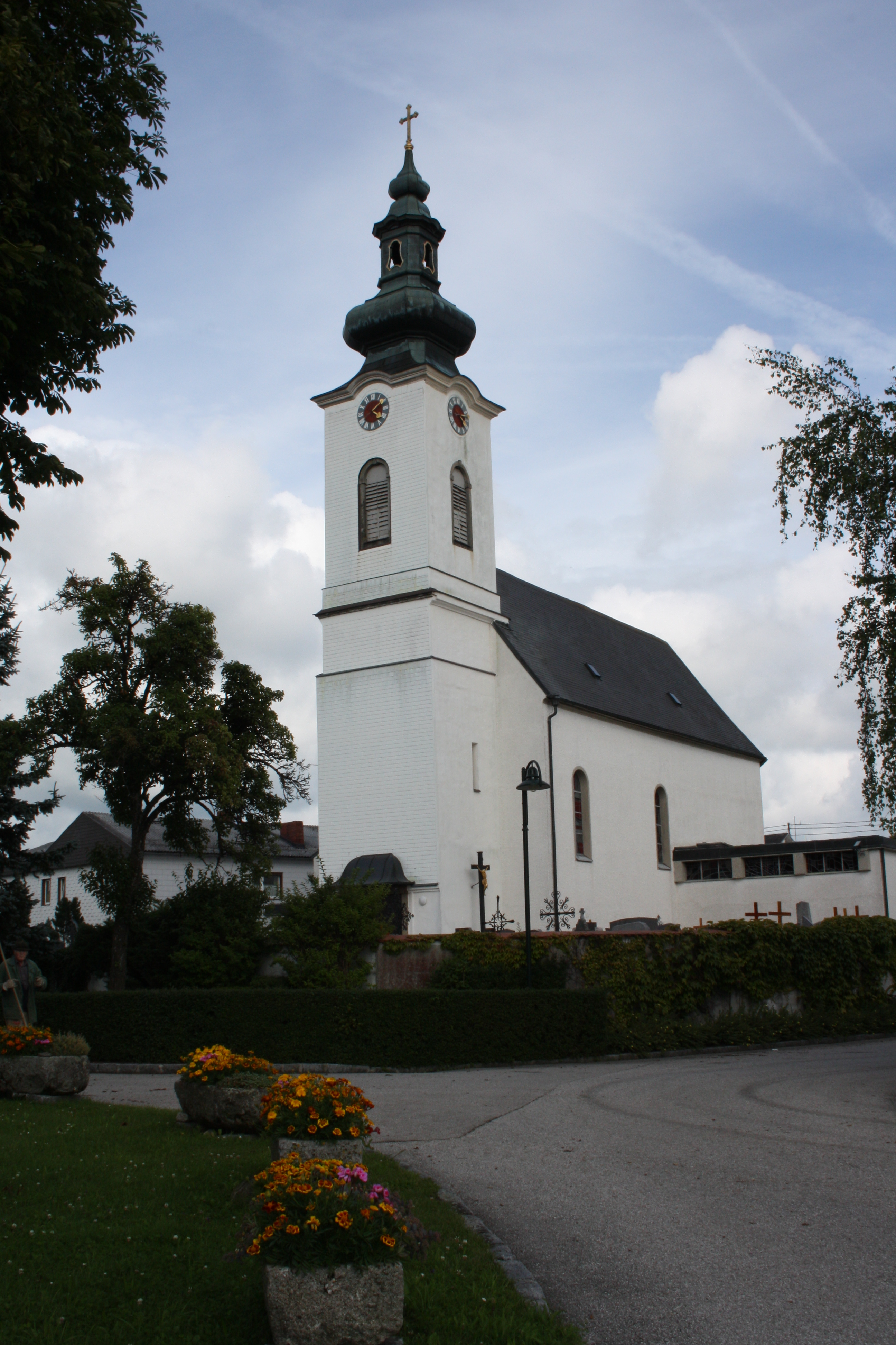 Kath. Pfarrkirche hl. Ägidius und Friedhof (Ansicht: südwest)